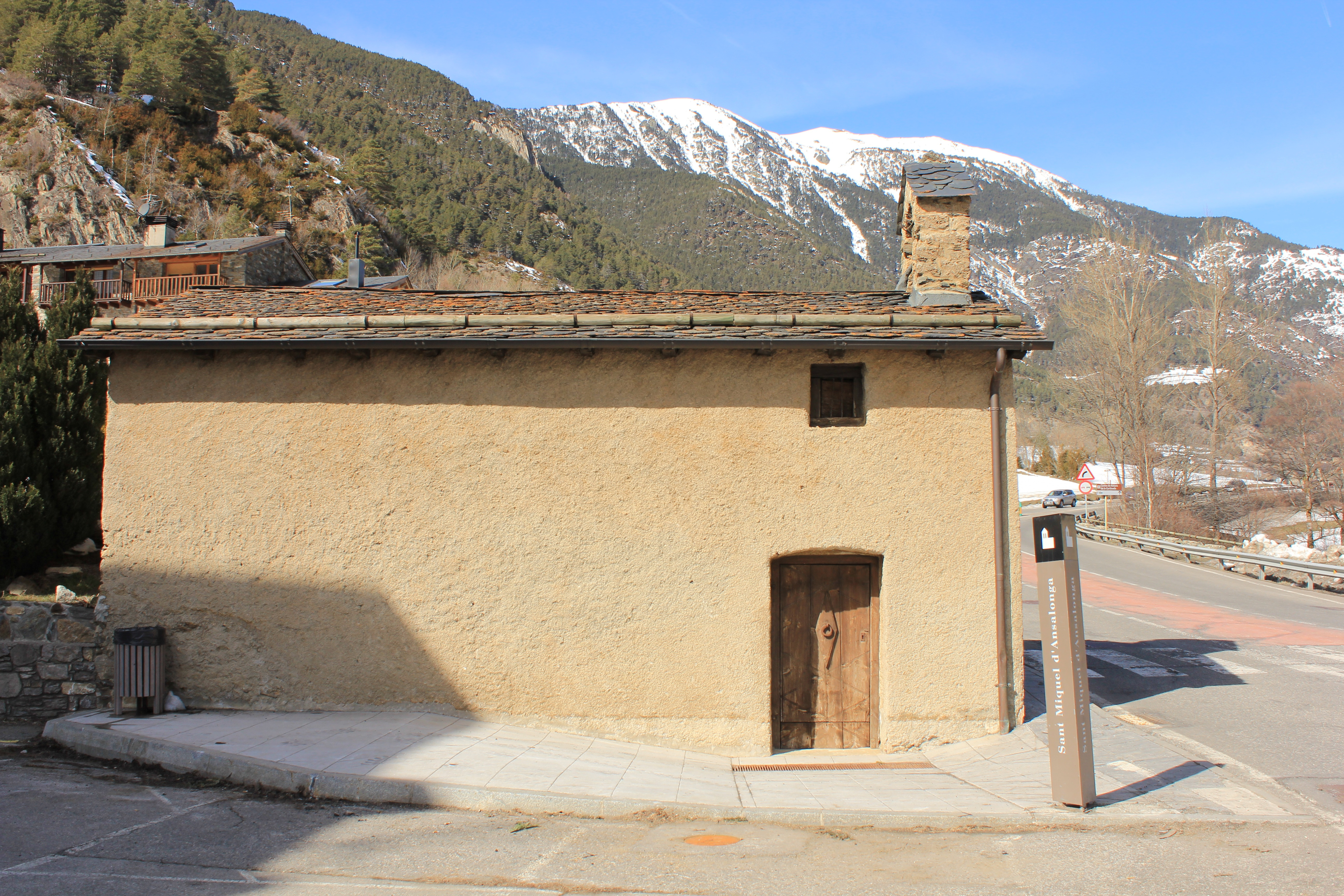 Església de Sant Miquel d'Ansalonga